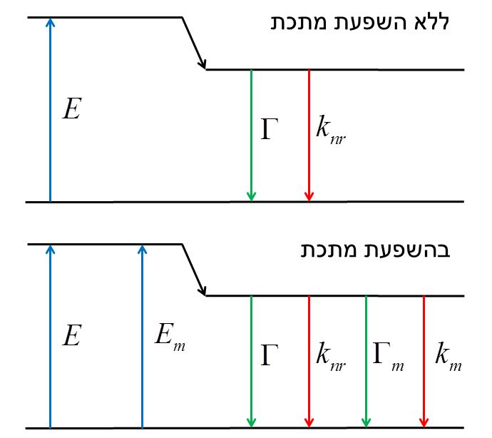 דיאגרמת יבלונסקי עבור פלסמופור